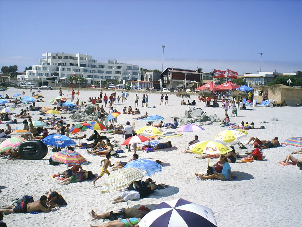 Vista de Bahía Inglesa. Playa Bahía Inglesa del municipio de Caldera.